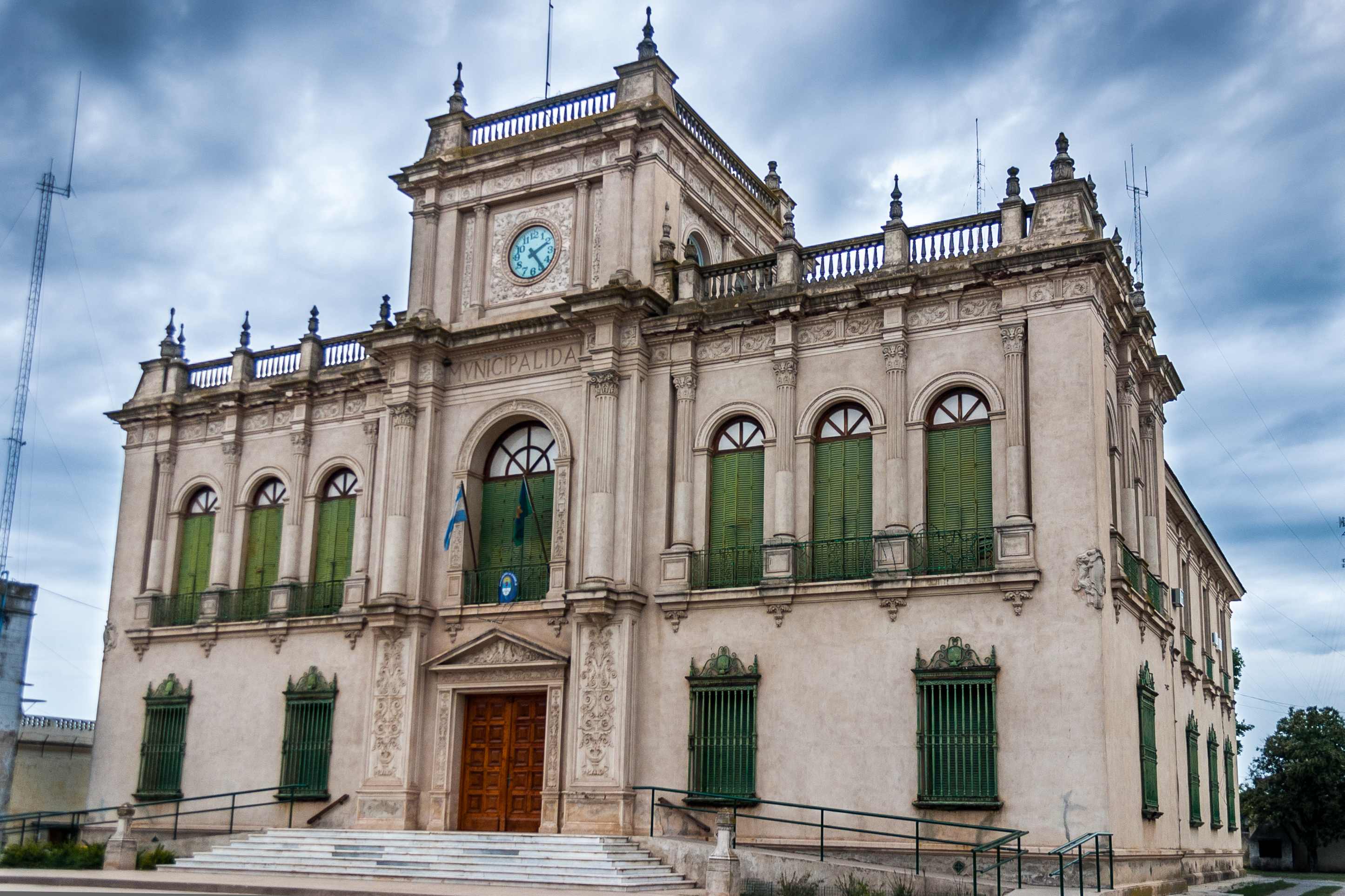 Palacio municipal,de Rivadavia, América, Buenos Aires, Argentina